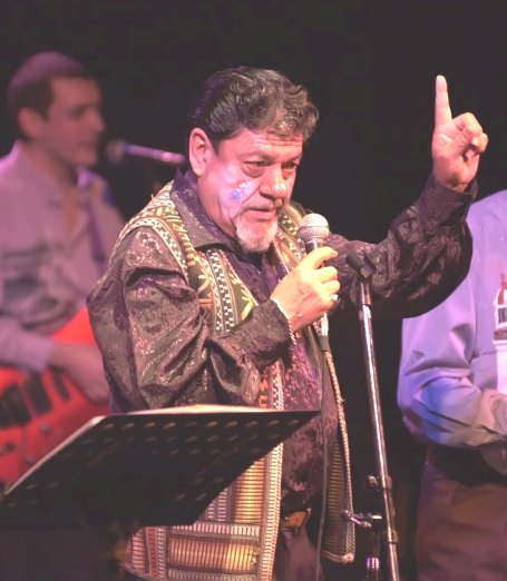 Washington "Canario" Luna, cantautor uruguayo, durante una presentación en la ciudad de La Plata, Argentina.